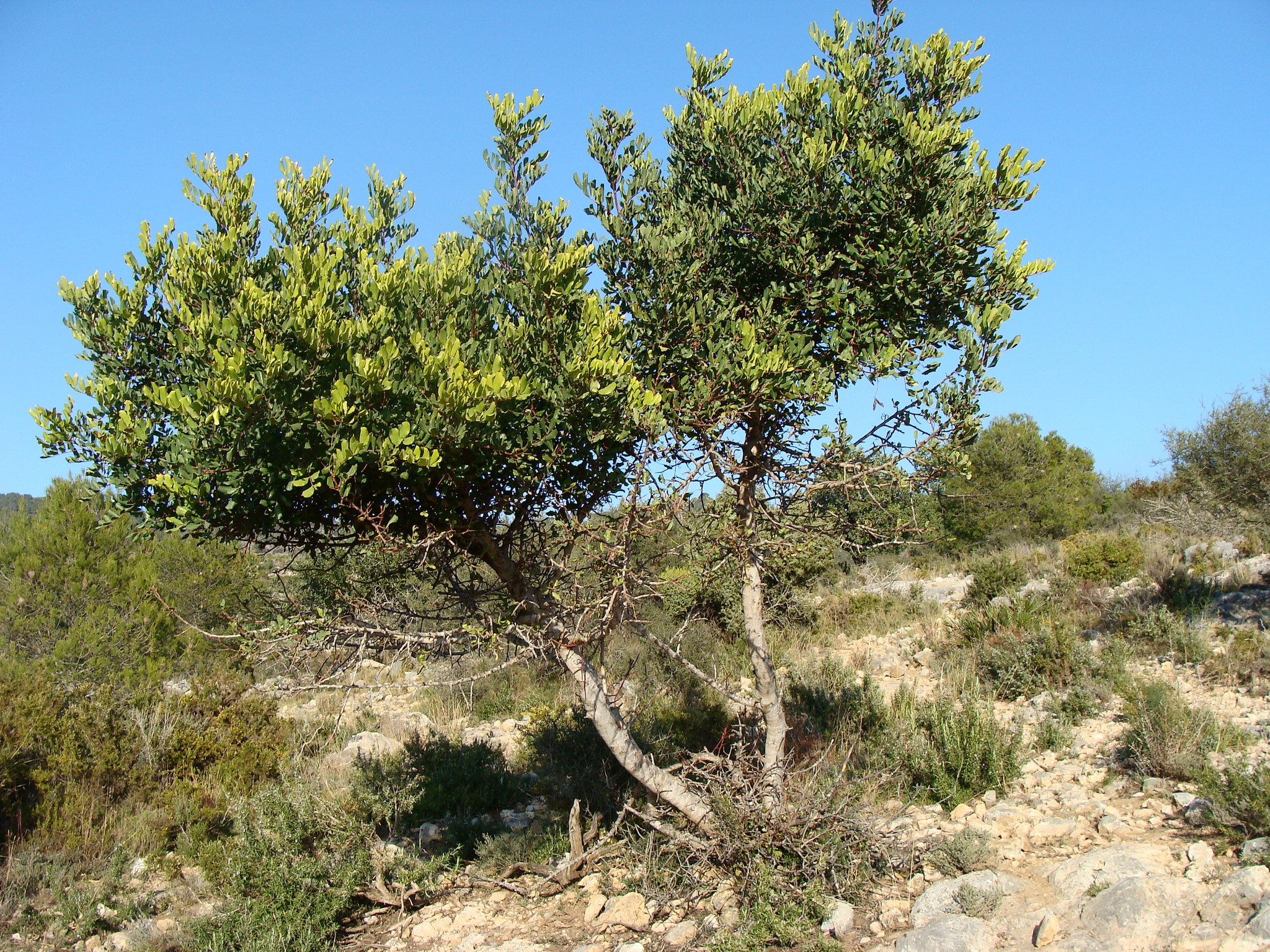 Algarrobo joven usado como forraje por un rebaño de cabras que usan las riberas del río Magro como cañada. Llombay, provincia de Valencia